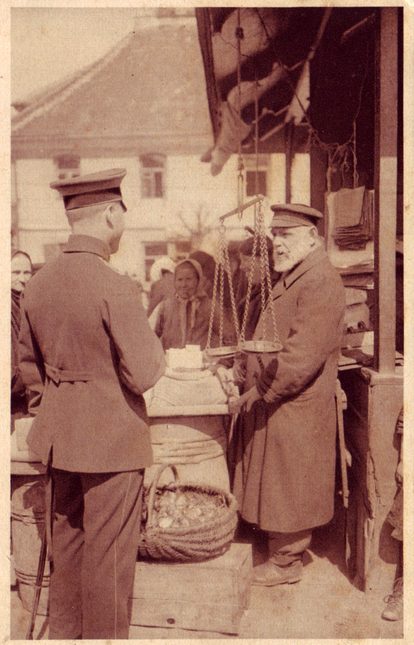 Vienas iš specialių vokiečių policininkų, prižiūrėjusių tvarką Vilniaus turguose kaizerinės okupacijos metais, Malkų turguje, apie 1916-1917 m.